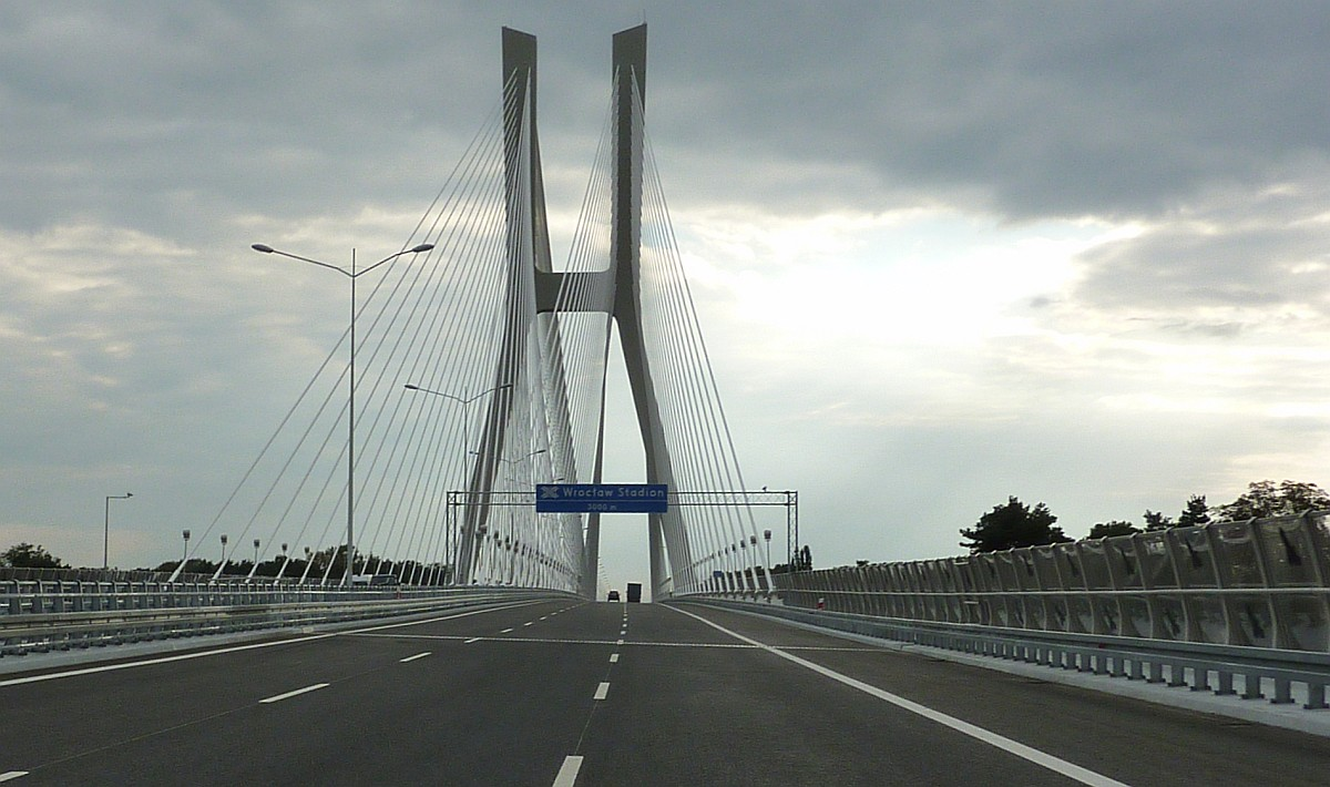 Dojazd do Mostu Rędzińskiego od północnego wschodu. Widoczna tablica zapowiadająca zbliżanie się do węzła drogowego "Stadion"